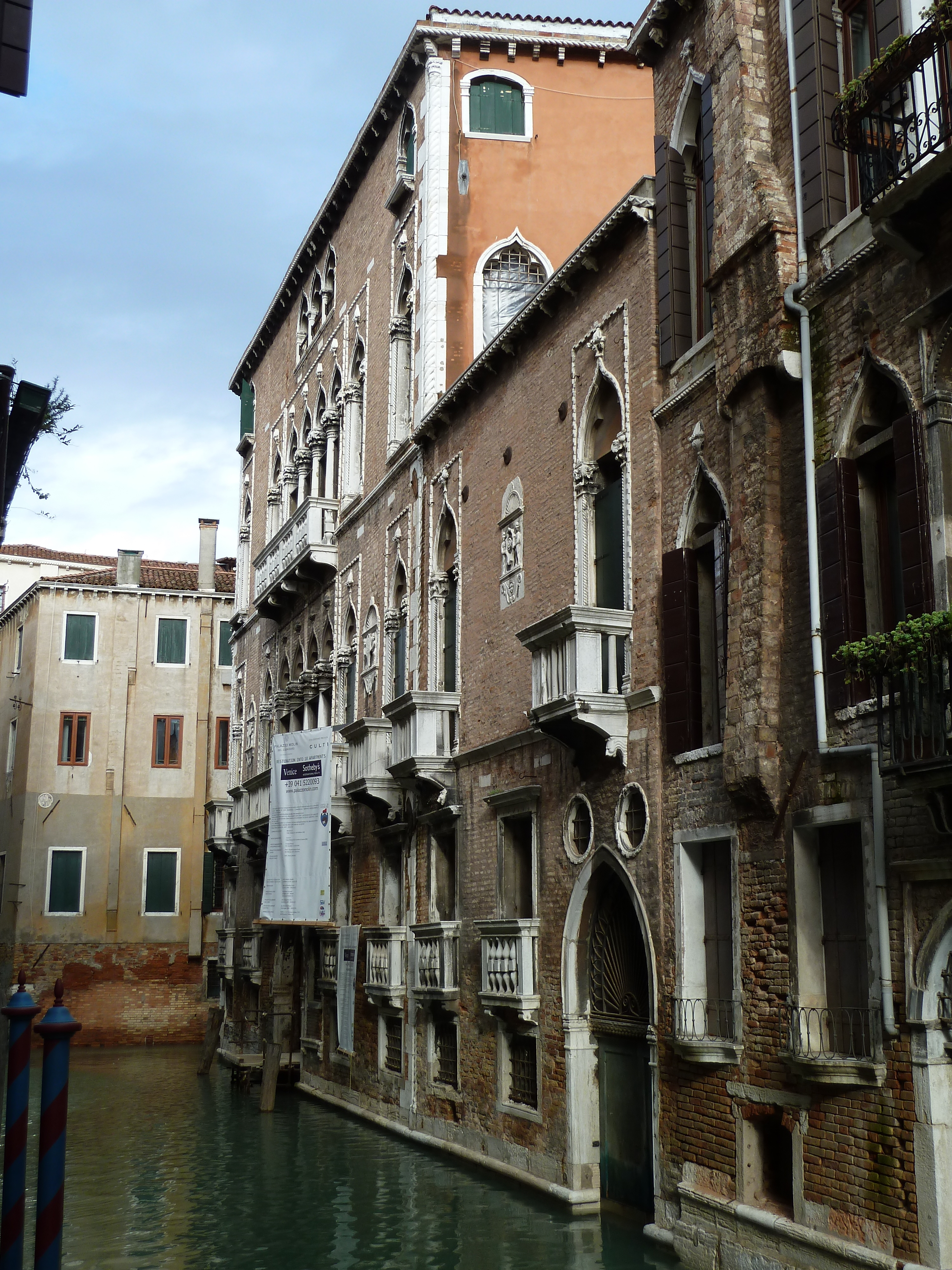 Palazzo molin del cuoridoro san marco